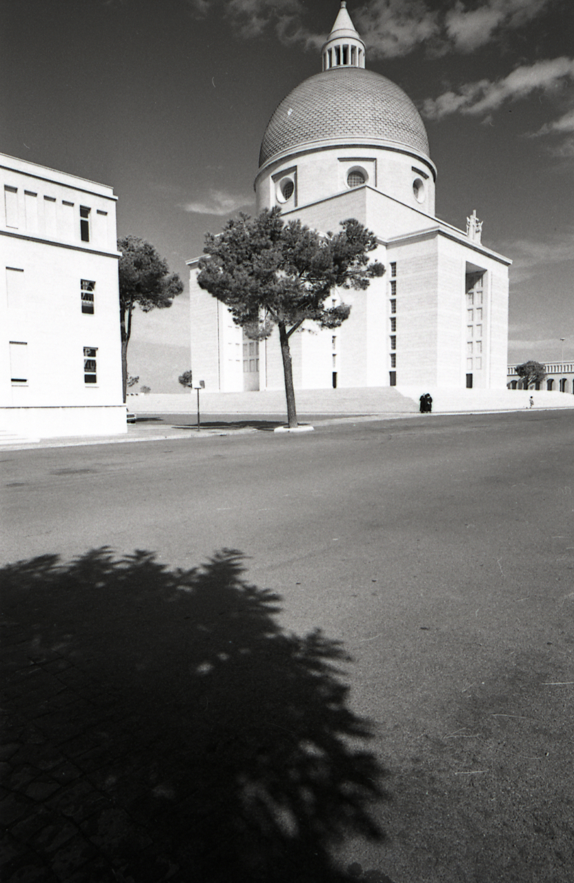 Servizio fotografico : Roma, 1967 / Paolo Monti. - Strisce: 6, Fotogrammi complessivi: 36 : Negativo b/n, gelatina bromuro d'argento/ pellicola ; 35 mm. - ((I fotogrammi hanno una doppia numerazione. . - Sul portanegativi: Leica M Adox 21. - Occasione: Pubblicazione sconosciuta per Edizione Montanari a mezzo Bestetti. - Fonte: Agenda di Paolo Monti: Monti/ 3 aprile 1966 - 9 marzo 1971/ 12421-16823 (1966-1971), presso Archivio Paolo Monti